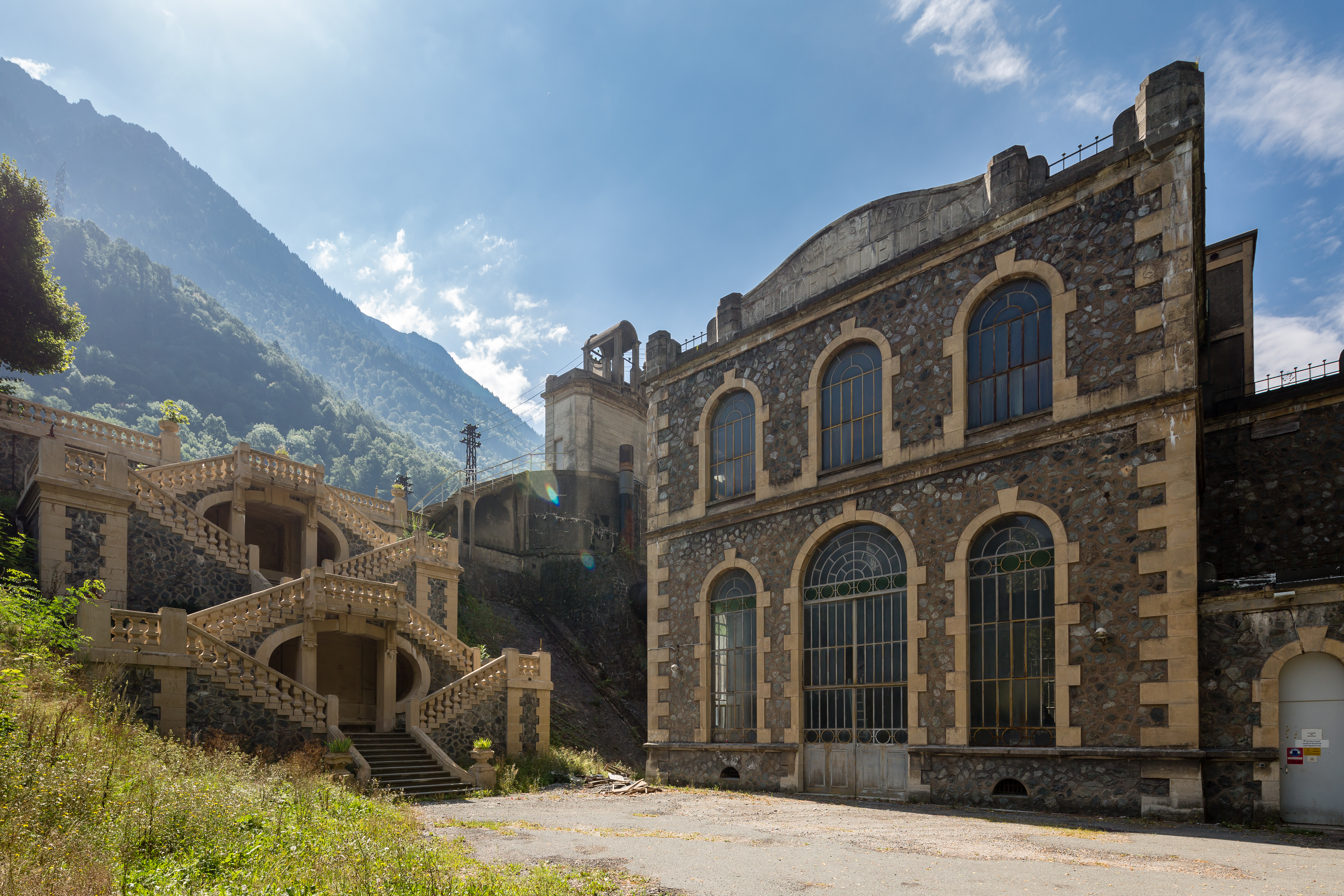 Centrale hydroélectrique des Vernes à Livet et Gavet (France).